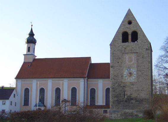 Wessobrunn, Grauer Herzog und Pfarrkirche St. Johannes Baptist